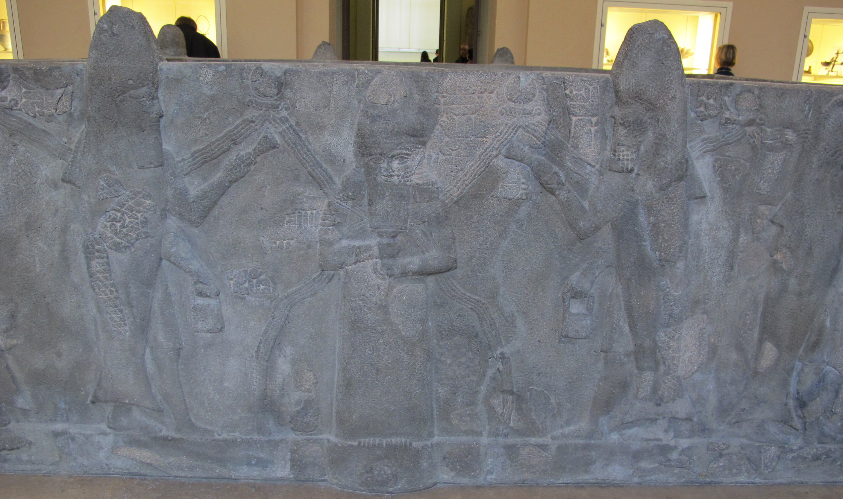 Vasca rituale da ashur, basalto, 704-681 ac. ca